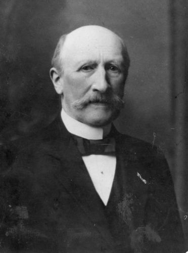 Isaac Anthoni van Roijen (1861-1938), burgemeester van Hoogezand